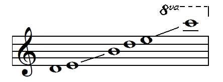 Kaval's tone range